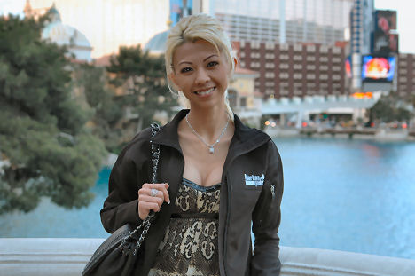 Liz Lieu